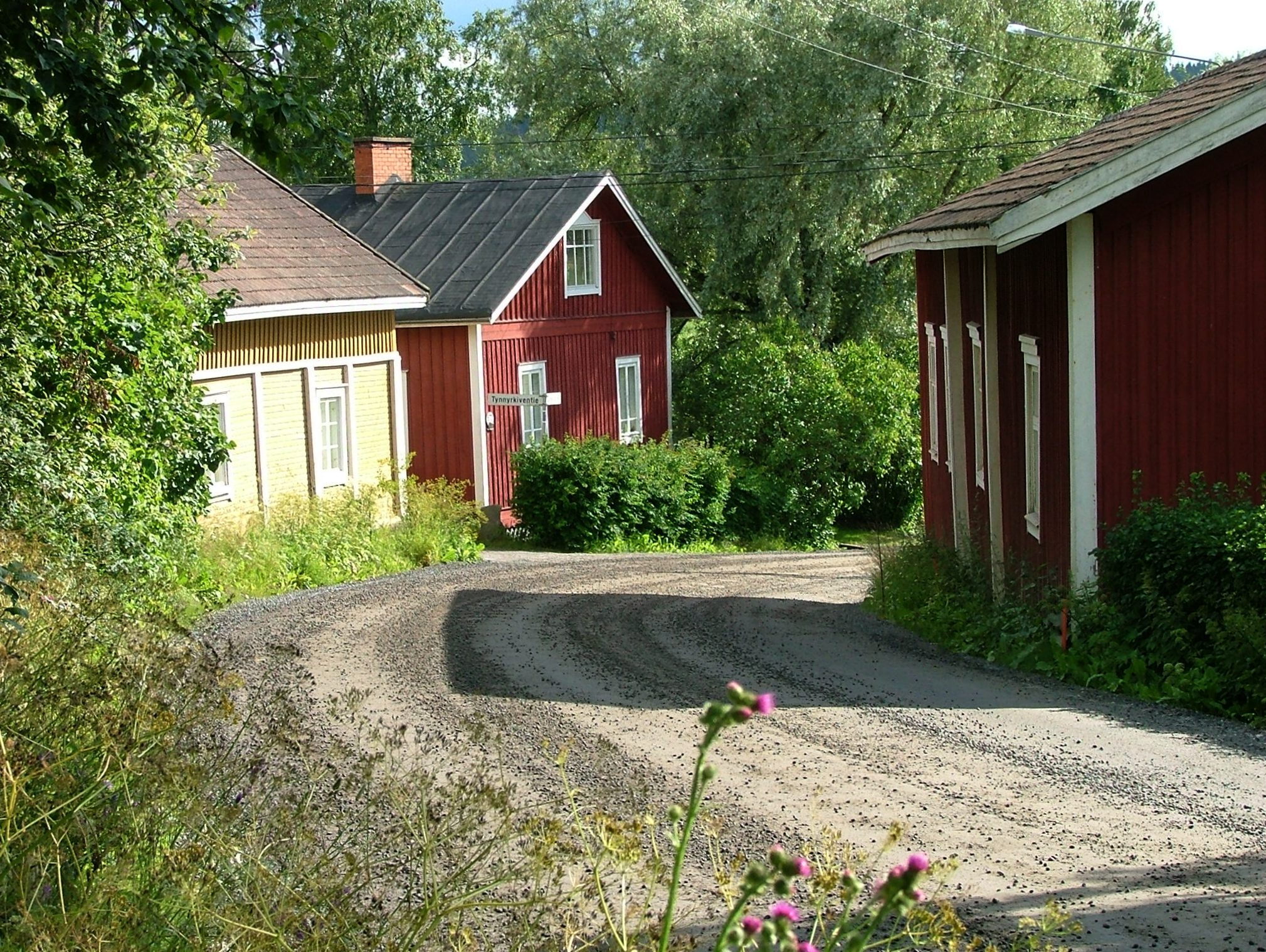 Sarkolan ja Vahalahden kyläkeskukset; rakennettu kulttuuriympäristö Nokialla